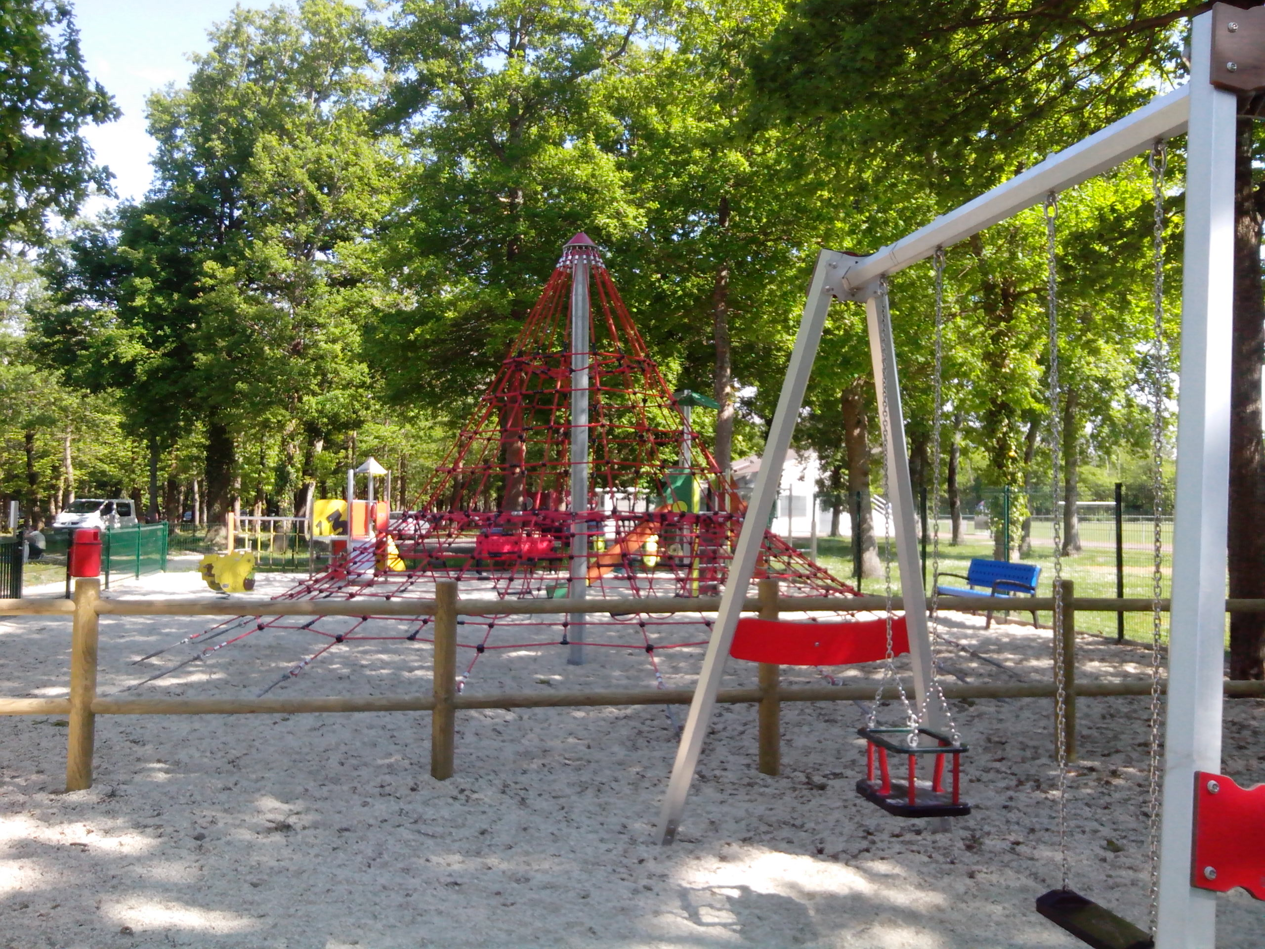 Aire de Jeux du Chemin de Sable, Etaules